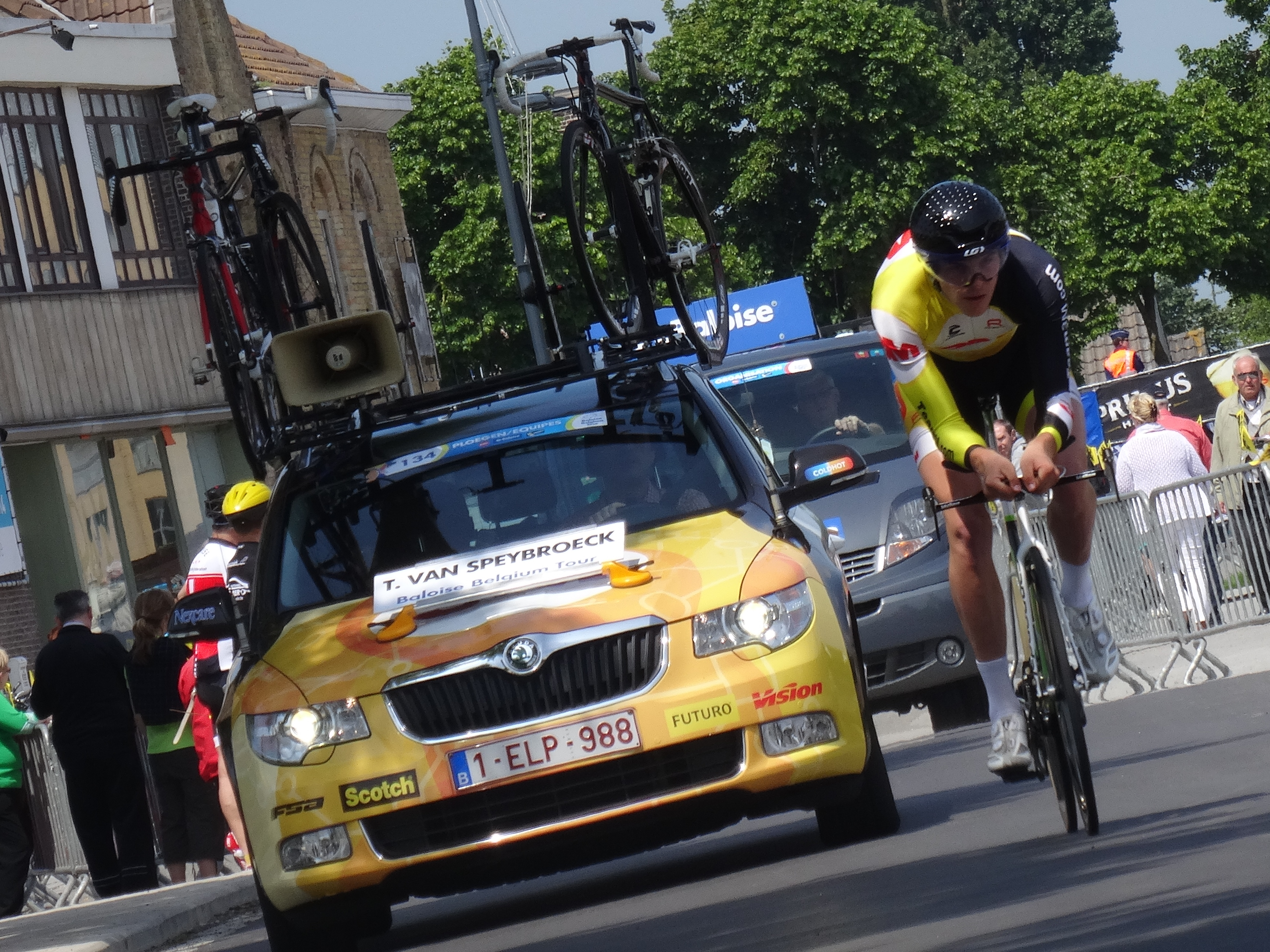 Reportage photographique réalisé le vendredi 30 mai à l'occasion du contre-la-montre individuel de la troisième étape du Tour de Belgique 2014 à Dixmude, Belgique.